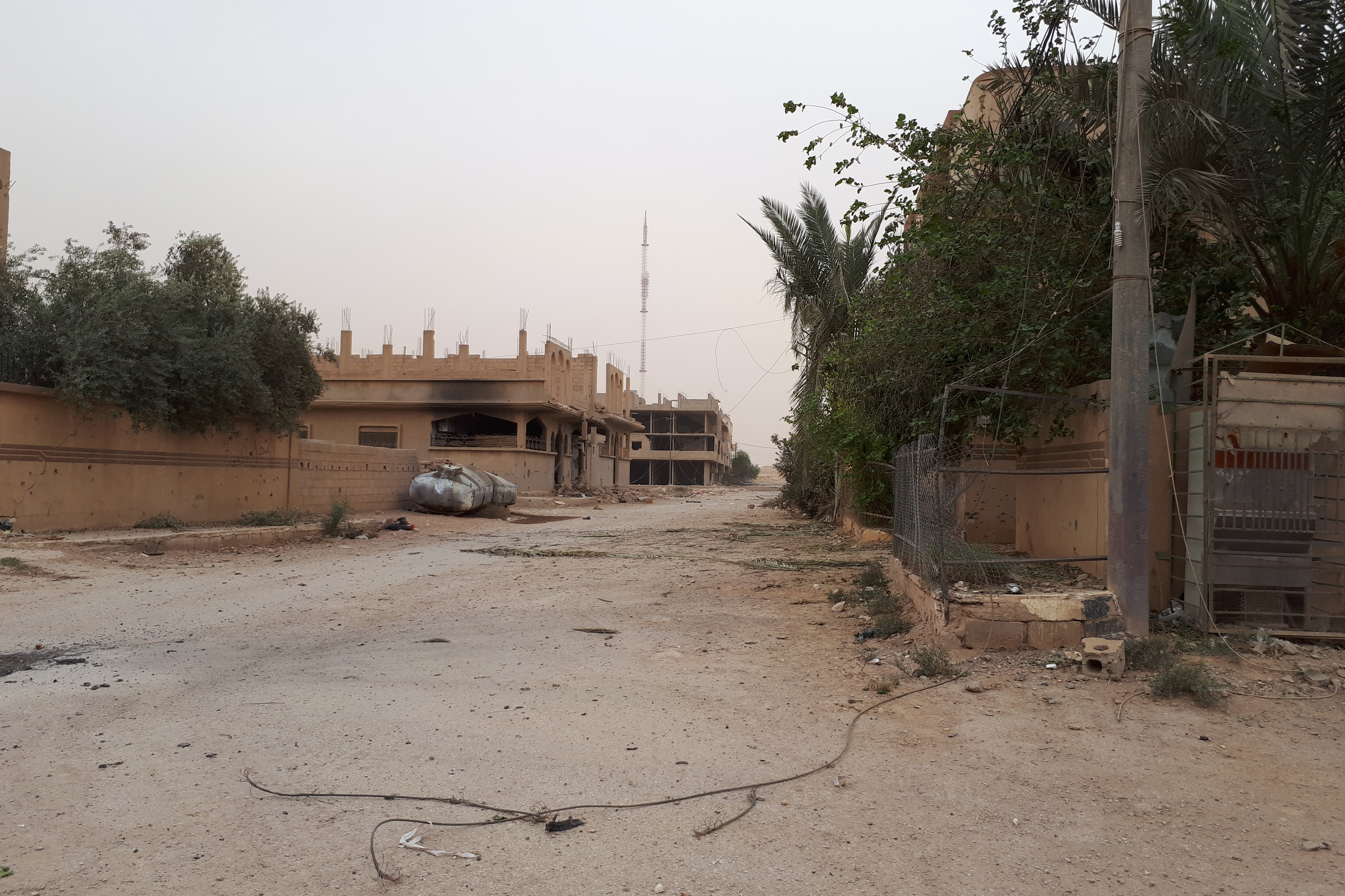 после освобождения